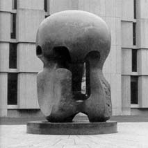 "Nuclear Energy," a sculpture by Henry Moore commemorates the first controlled nuclear chain reaction. The site, on the campus of the University of Chicago, was declared a National Historic Landmark in 1983.